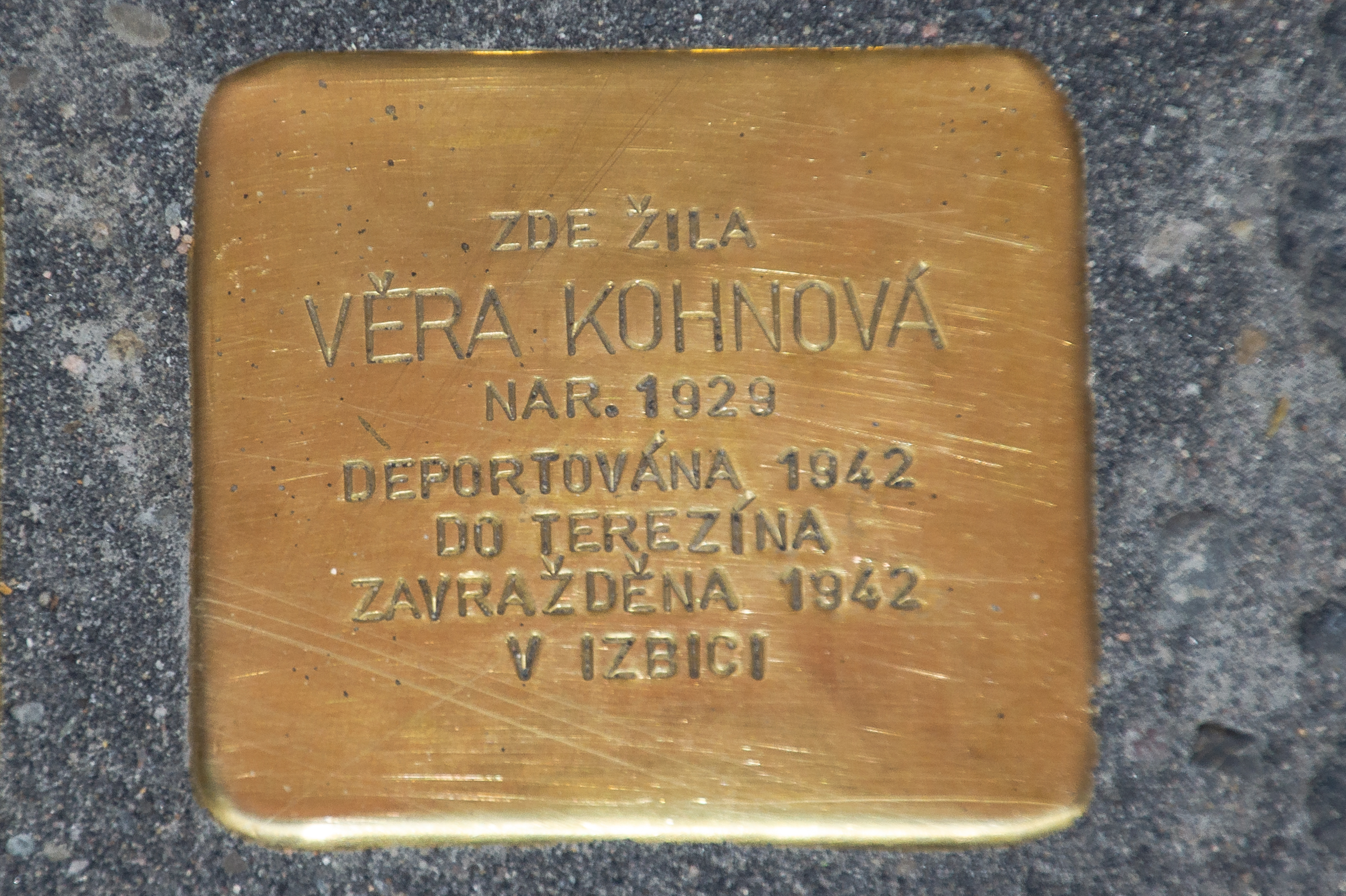 Stolperstein Věra Kohnová